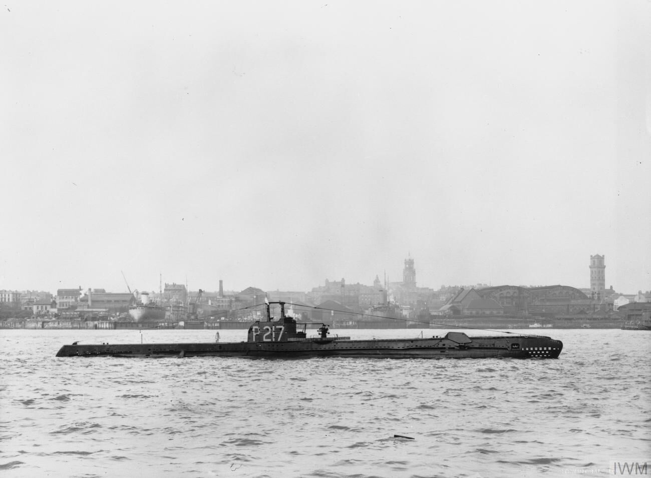 HMSM SIBYL underway